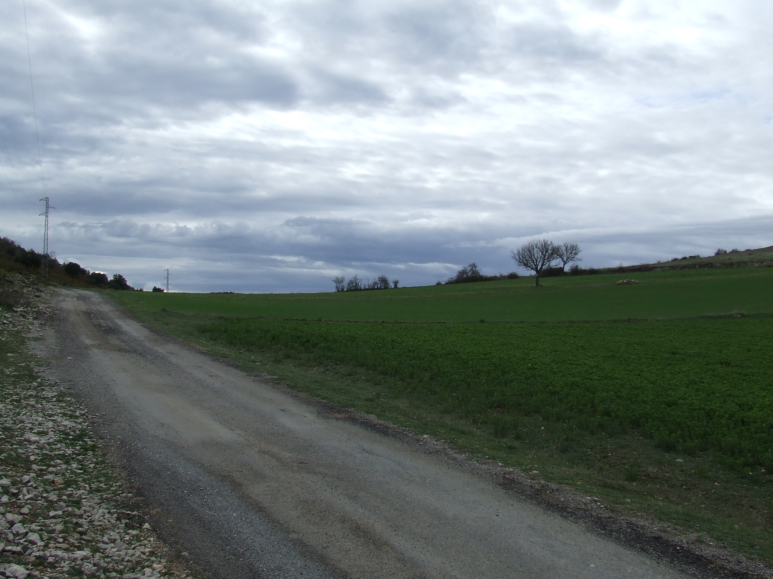 El Coll de Fabregada, pel costat de Sant Esteve de la Sarga (Pallars Jussà)